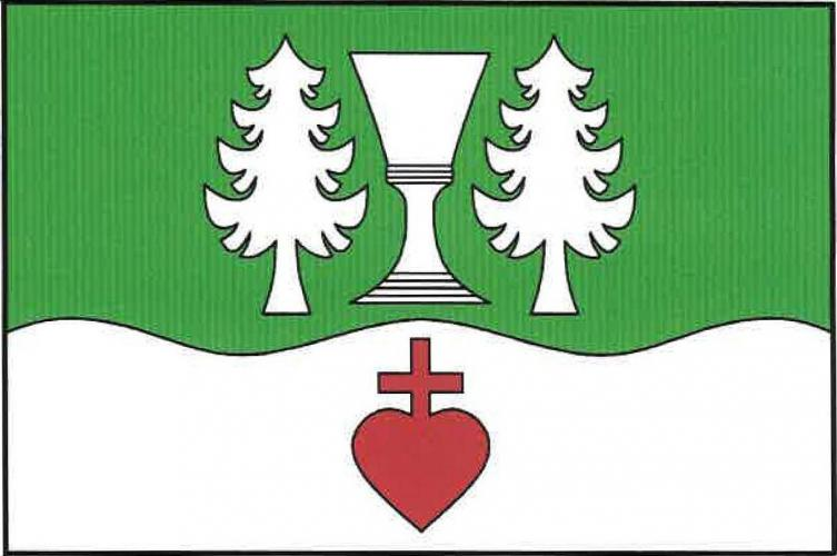 Vlajka, Nové Hutě, okres Prachatice